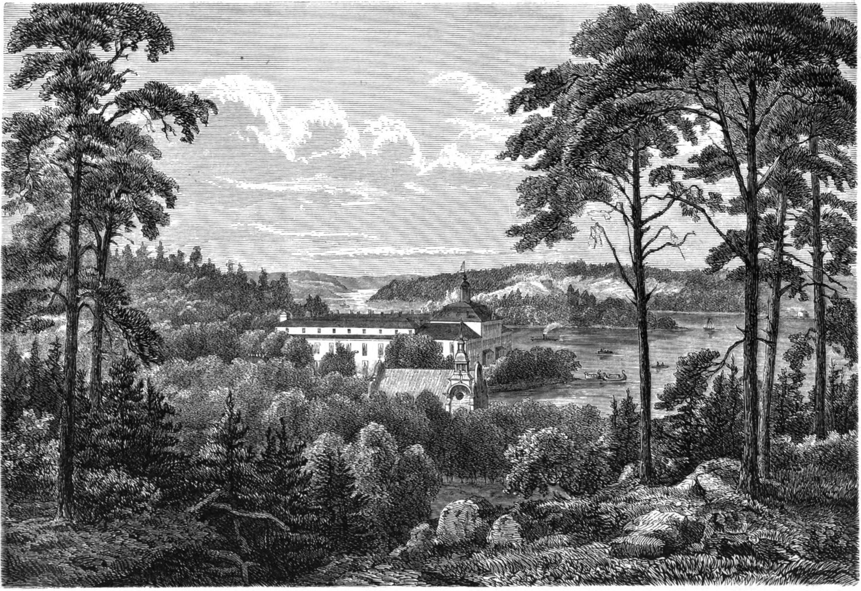 Ulriksdals slott och park.